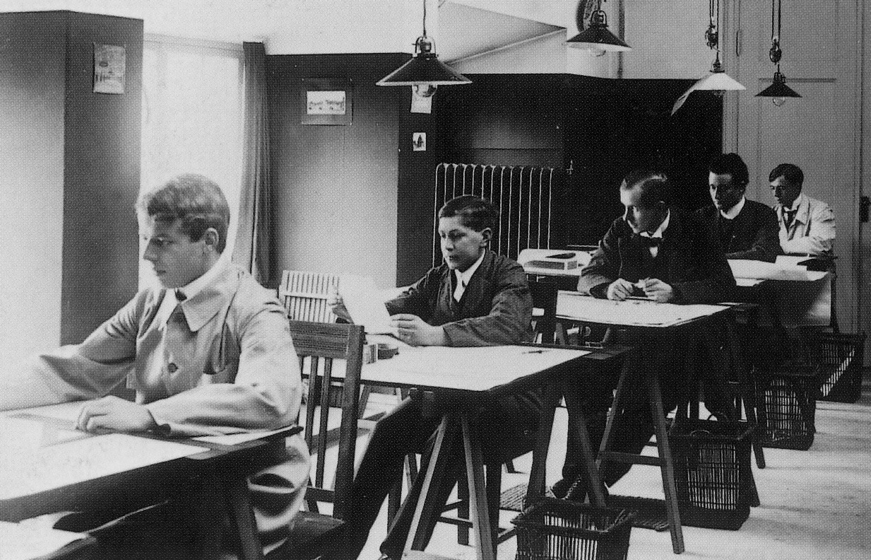 Längs bak sitter Edvin Engström på sin första arbetsplats på Stureplan 13 i Stockholm